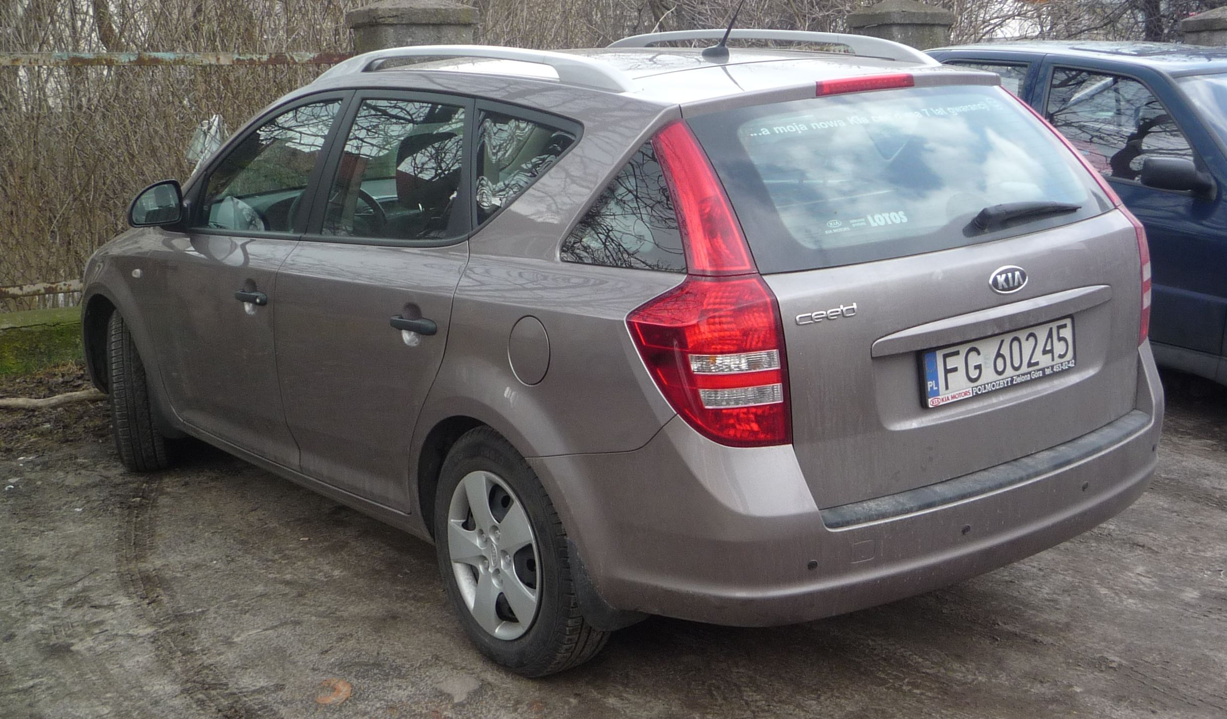 Kia cee'd SW w Słubicach.